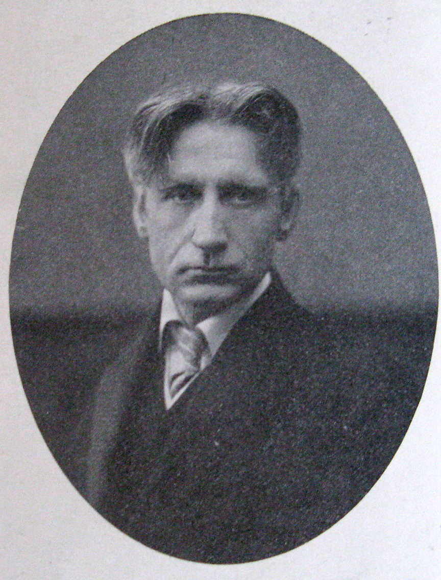 Danish painter Harald Slott-Møller (17. august 1864 i København – 20. oktober 1937)